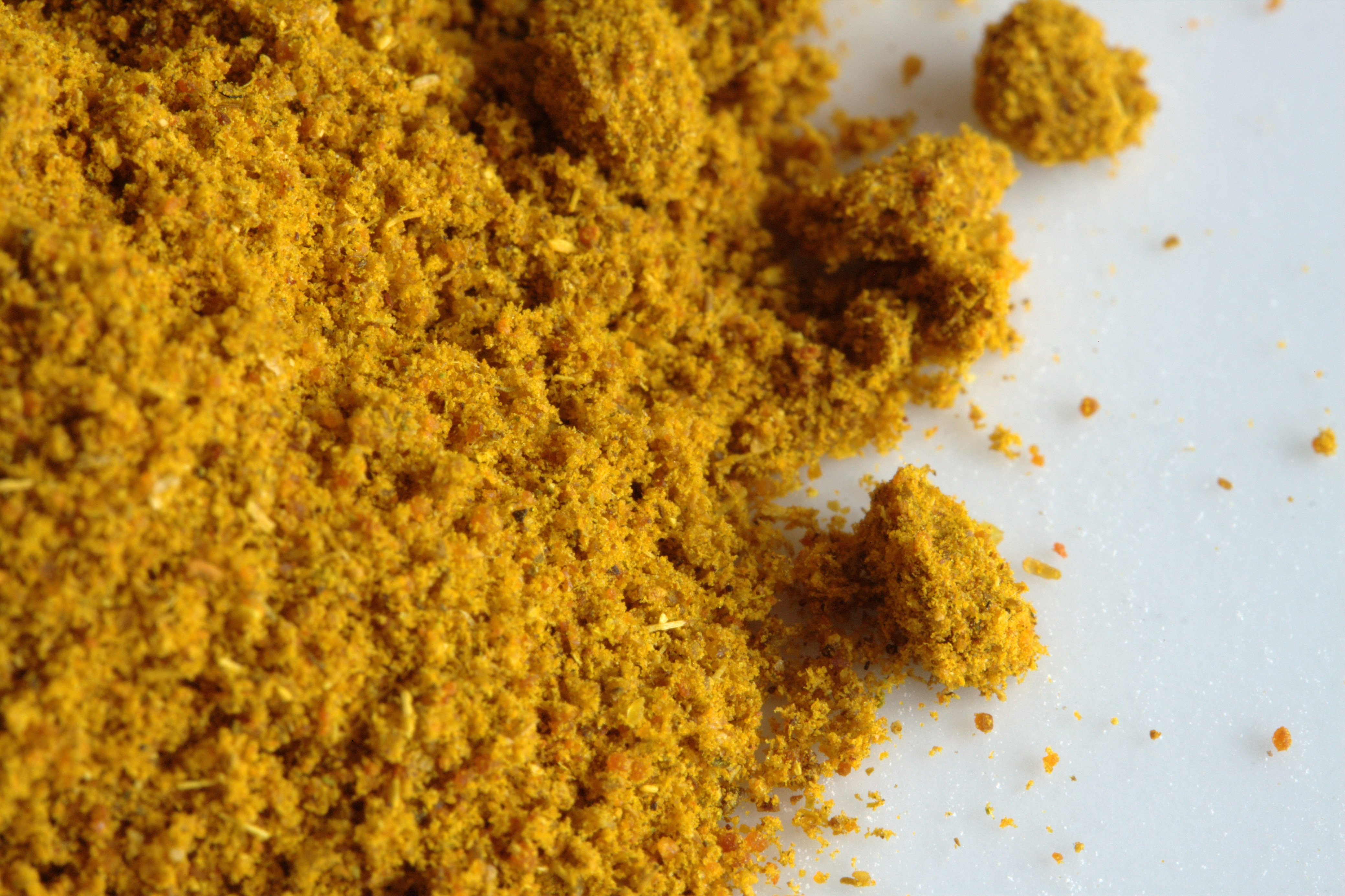 Currypulver